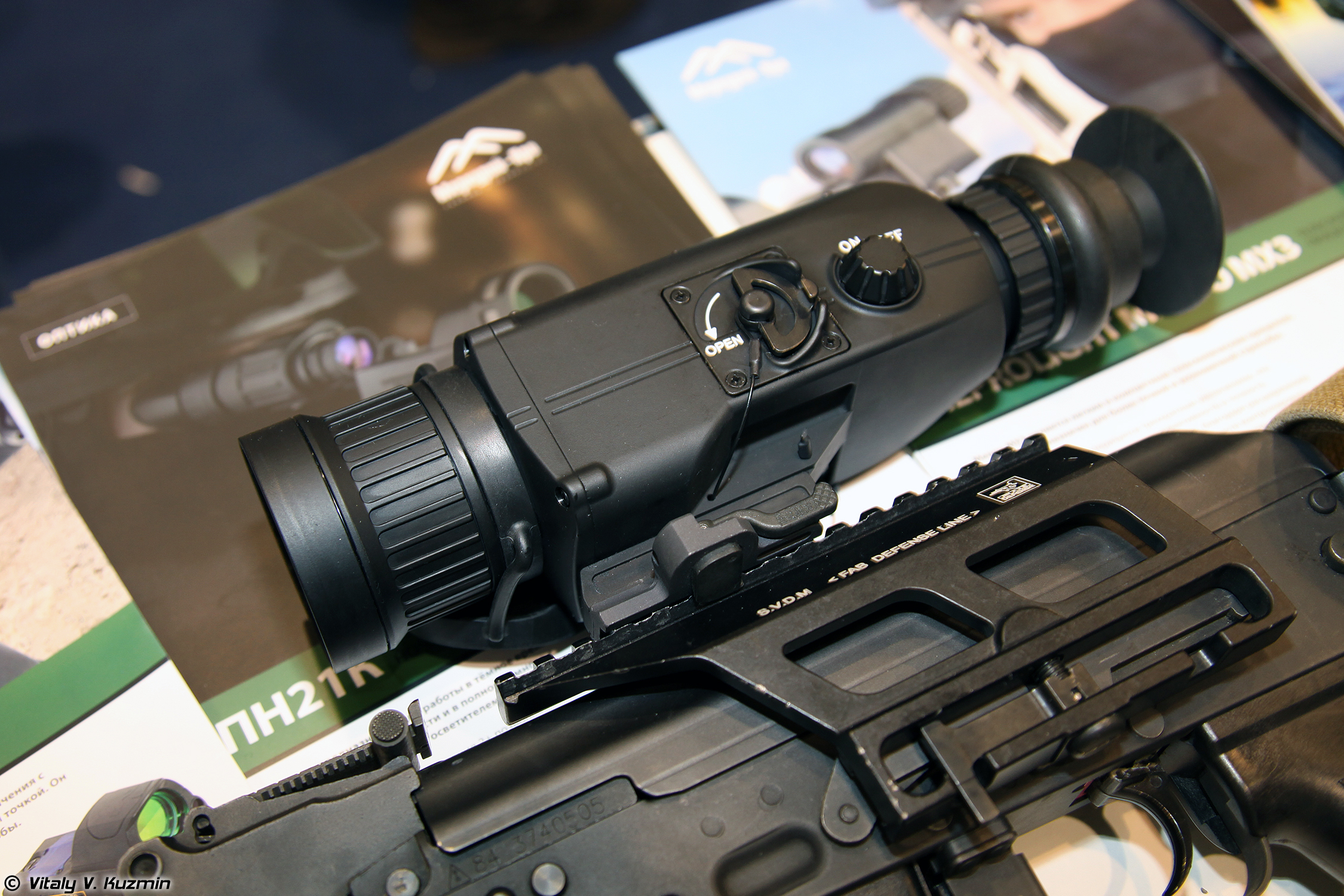 Тепловизионный прицел Касатка (Kasatka thermal imaging sight)